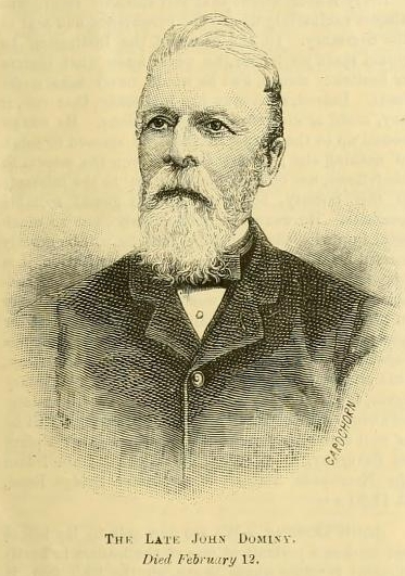 John Dominy